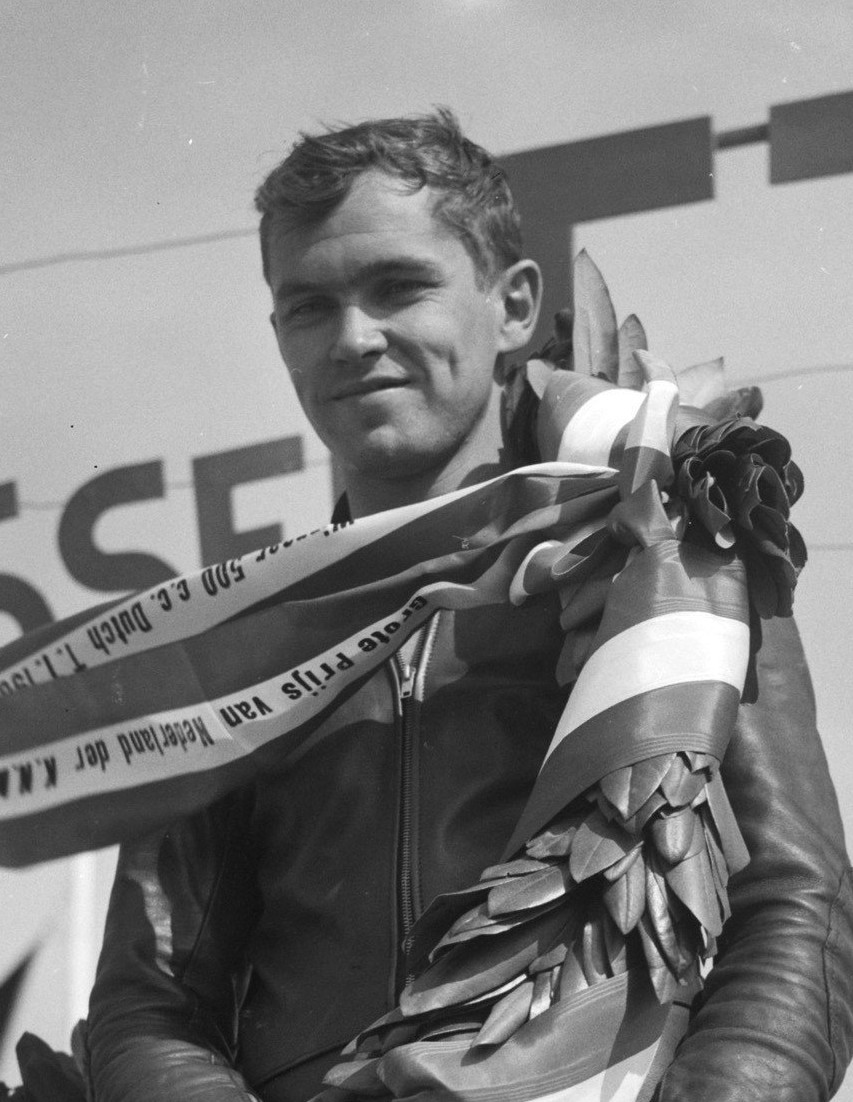 Huldiging Gary Hocking (Rhodesië) winnaar 500cc race met bloemen, TT Assen 1961